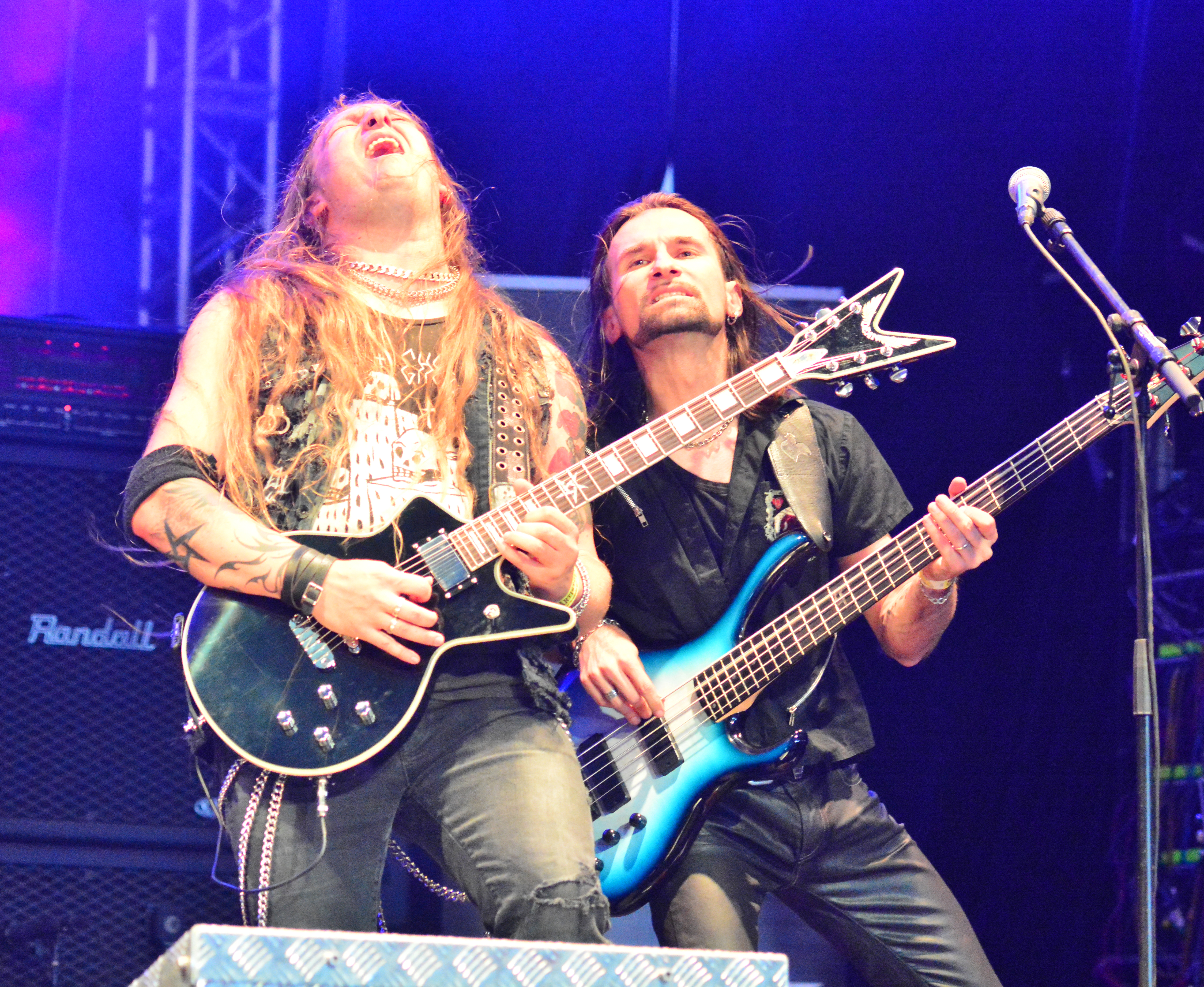 Arthemis beim Wacken Open Air 2014